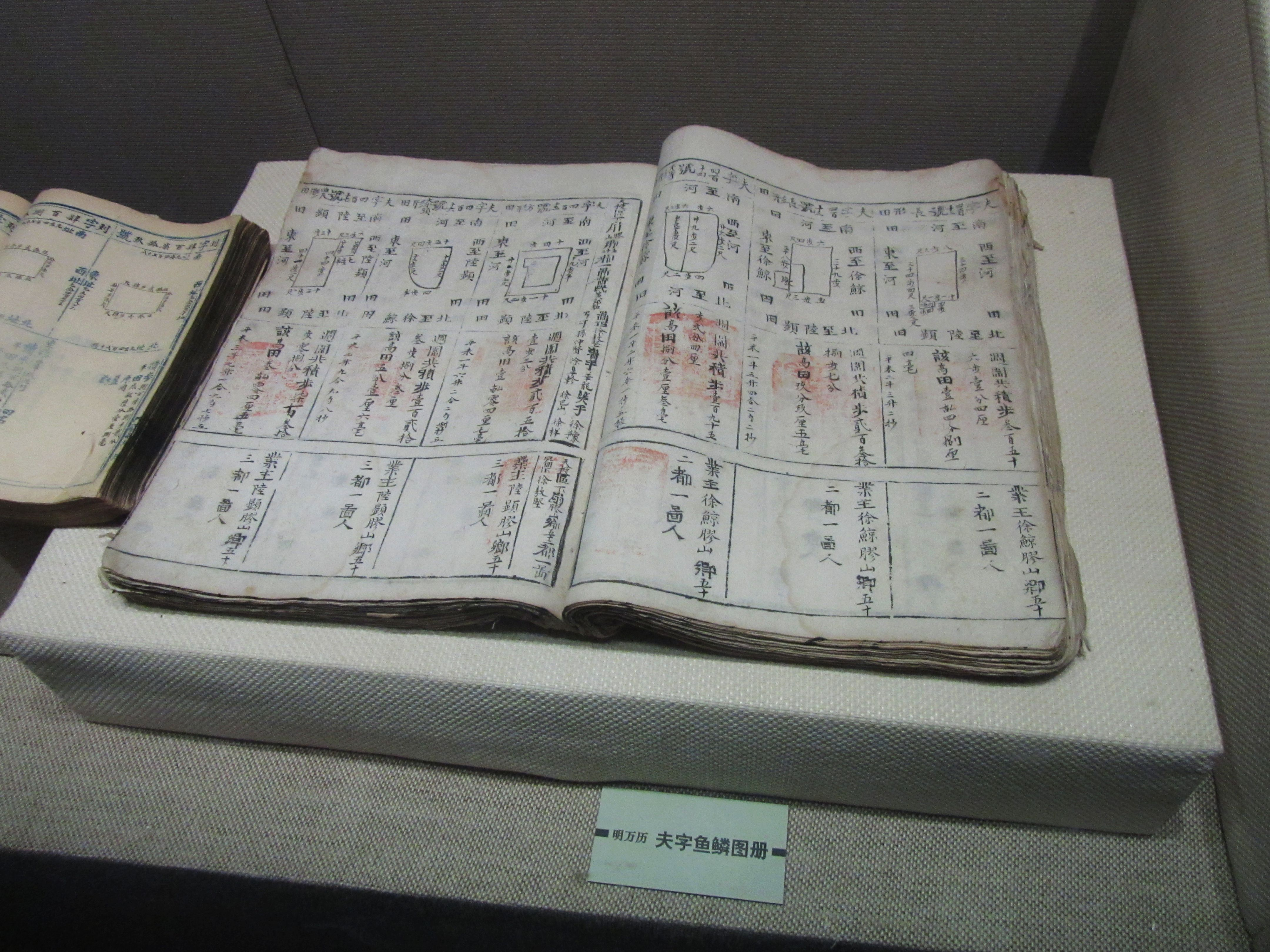 无锡博物馆藏明万历夫字鱼鳞图册。